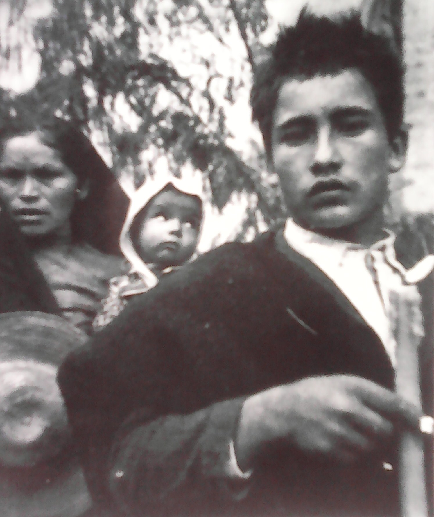 Indígenas muiscas fotografiados por Luis Benito Ramos en 1935, en el departamento de Boyacá.